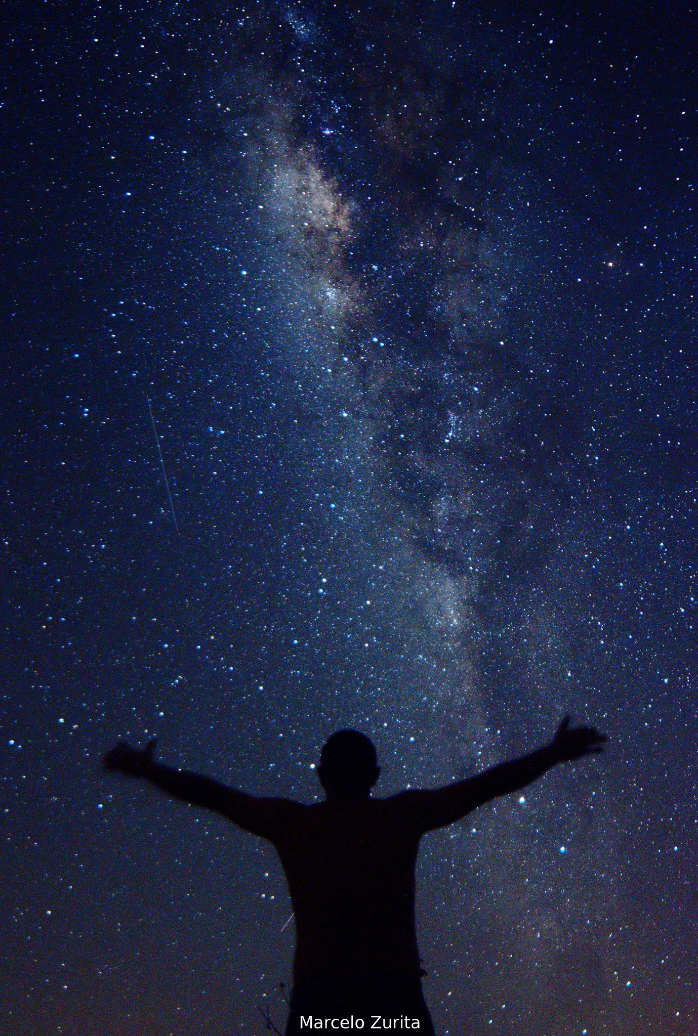 Homem abraçando a Via Láctea durante o III EPA!